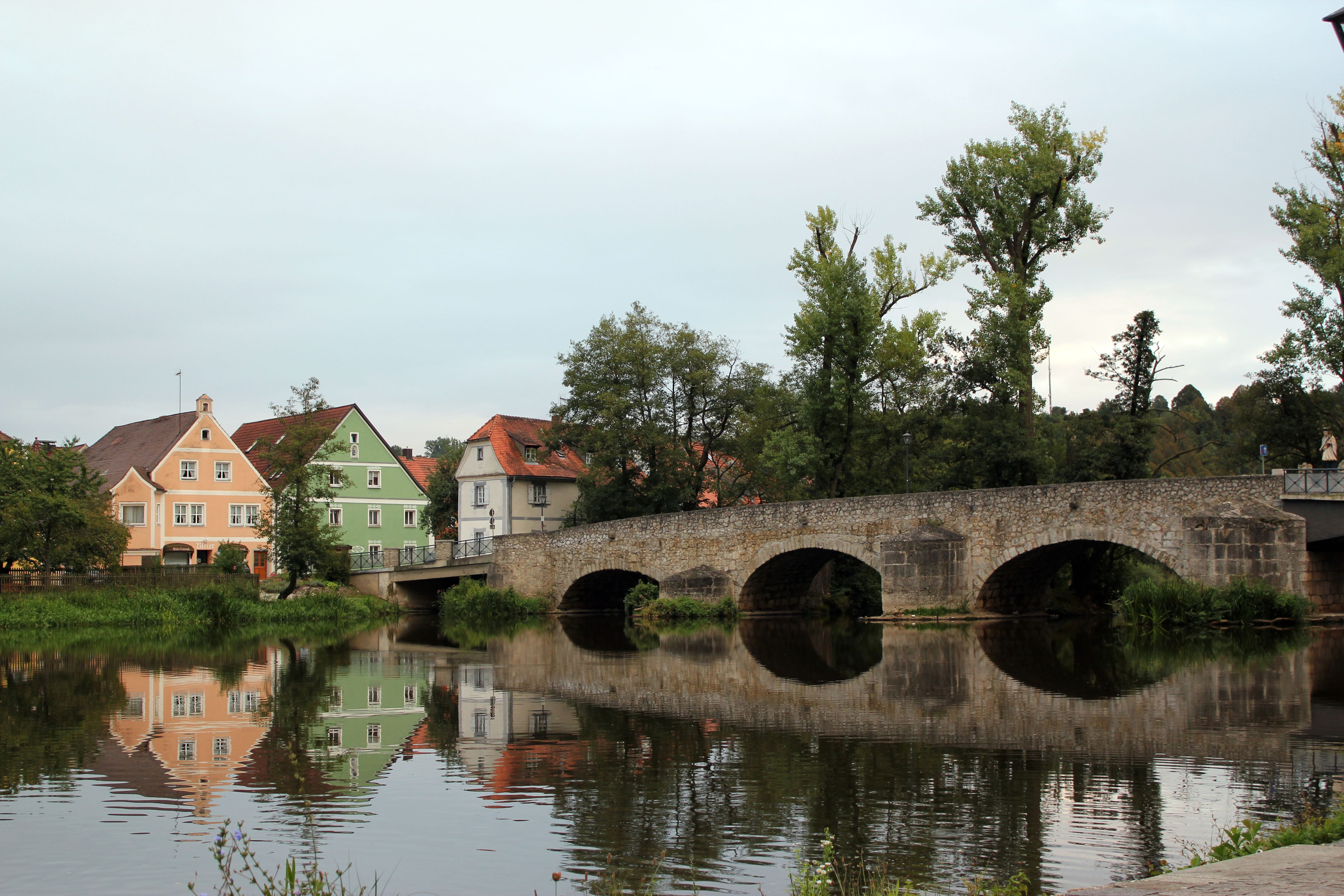 Kallmünz